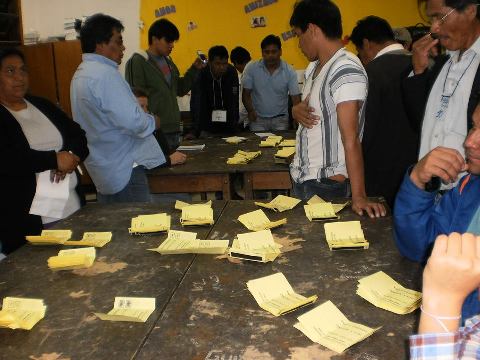 Eleições 2013